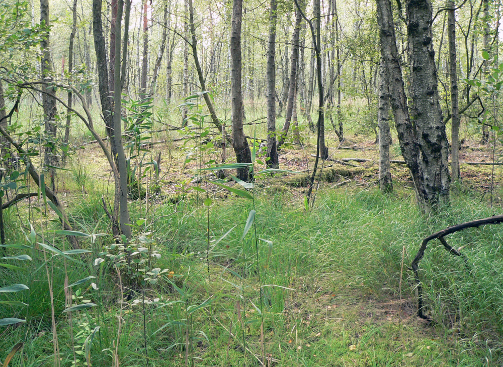 Vogelmoor